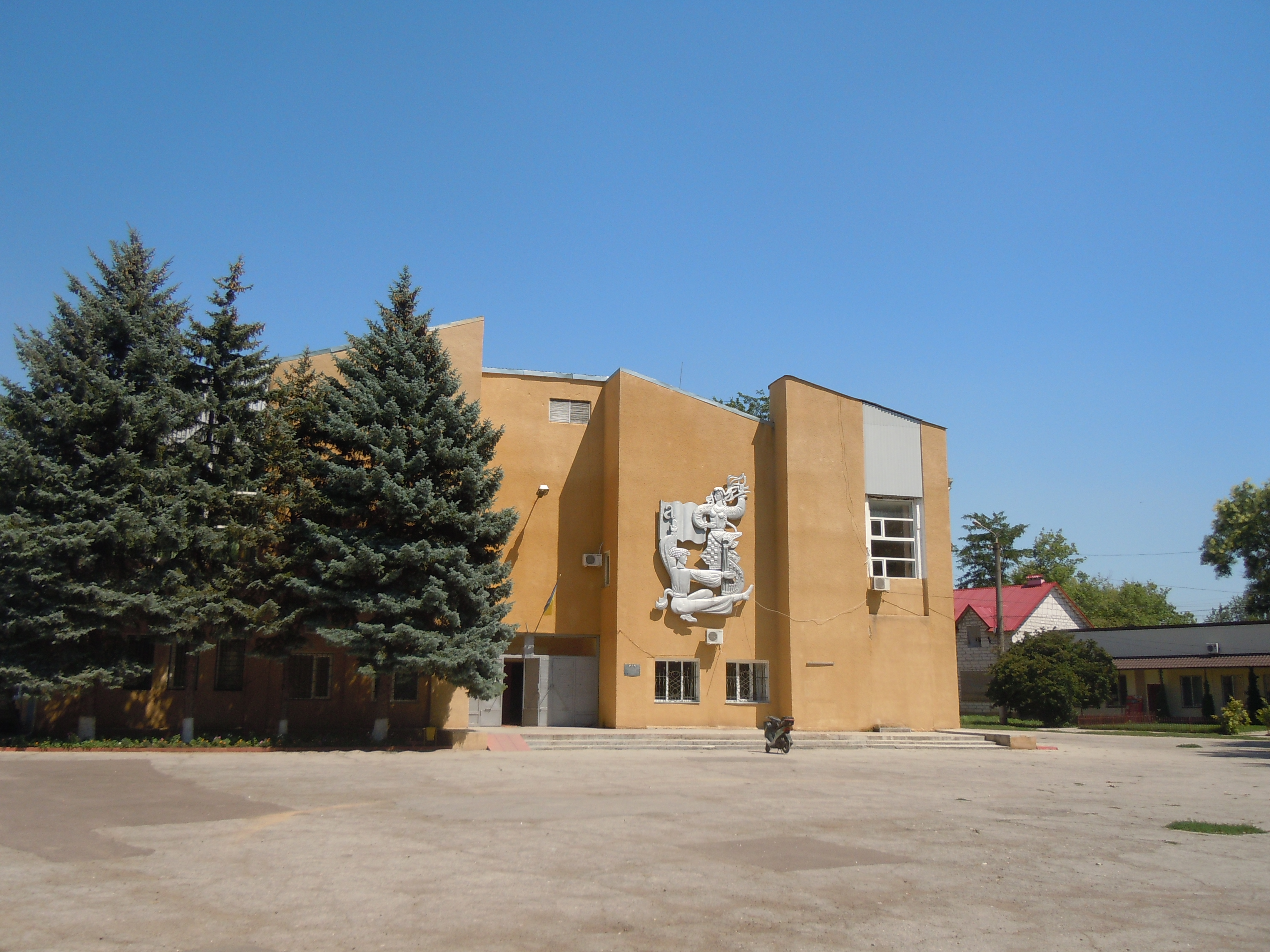 Будинок культури м. Біляївка